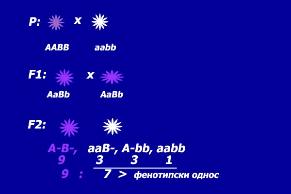 аутор Снежана Трифуновић